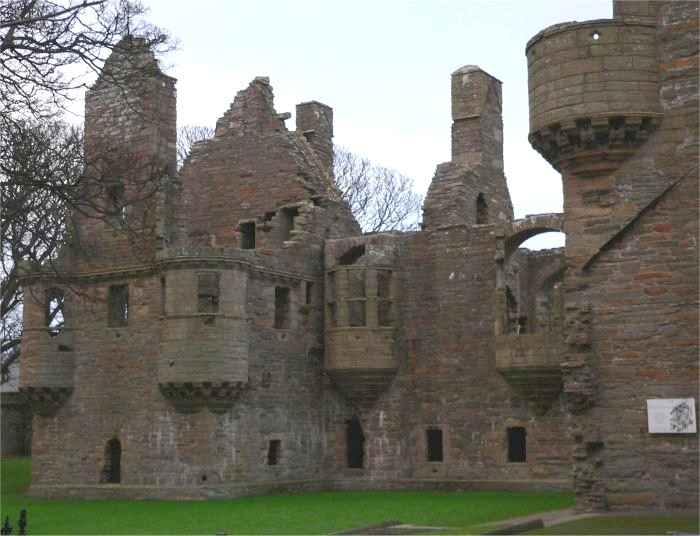 The Earl's Palace, Kirkwall